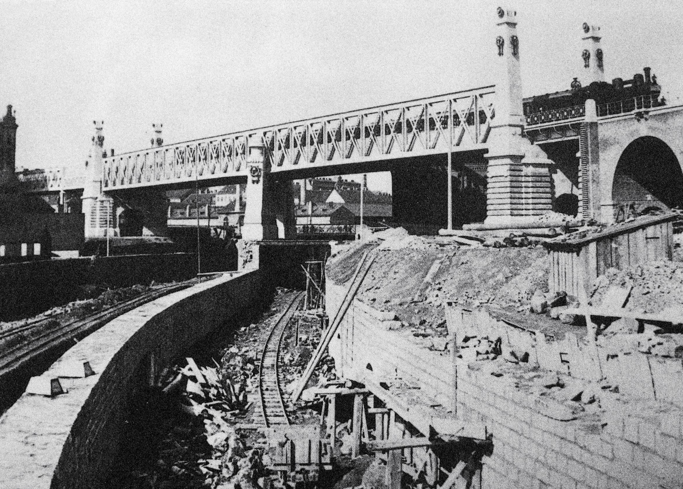 Wien, Otto-Wagner-Brücke über das Wiental